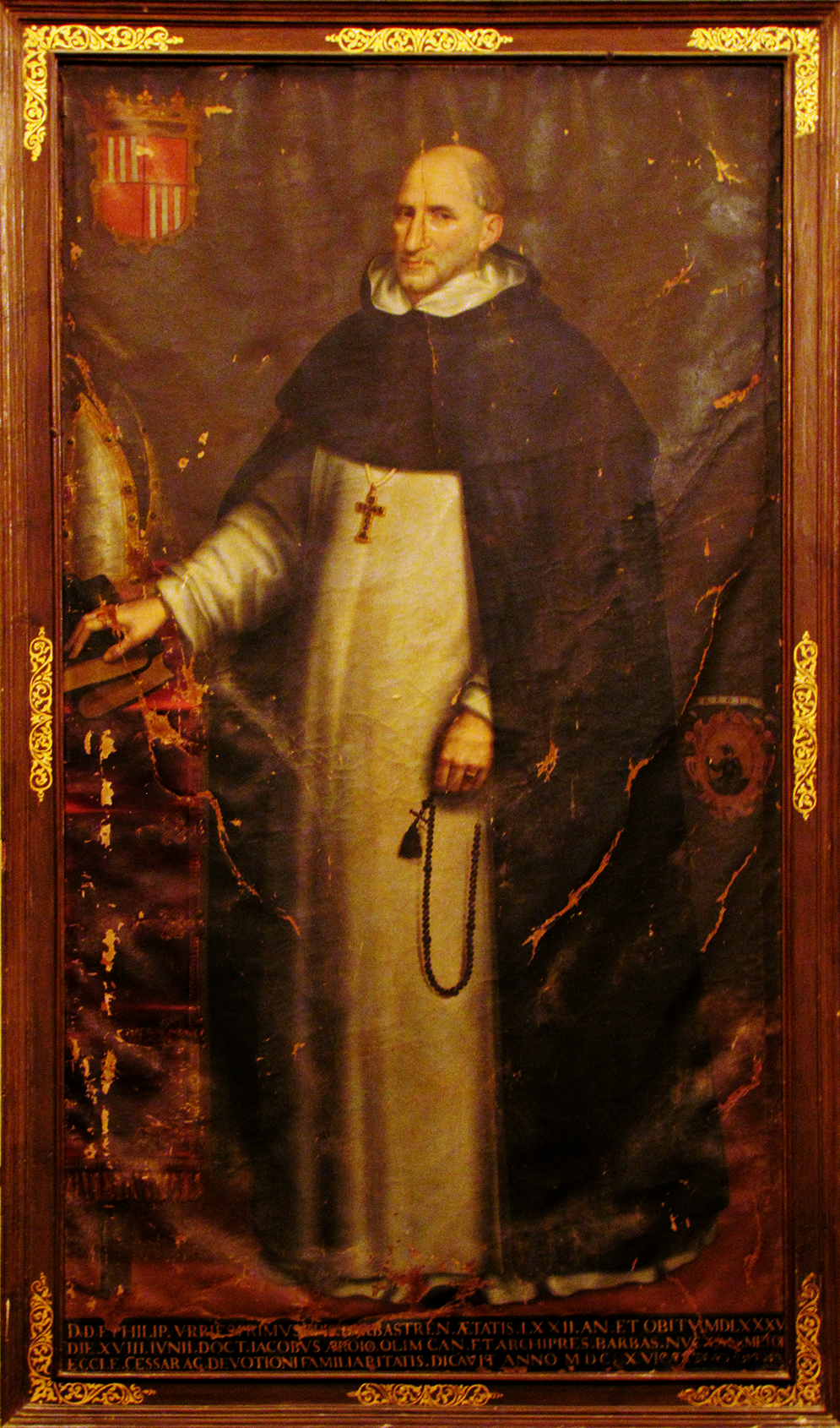 Retrato del prelado español Felipe de Urriés y Urriés (1515-1585), que fue obispo de Barbastro.